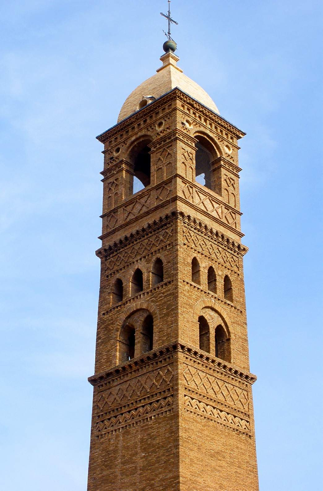 Tarazona - Iglesia de Santa Maria Magdalena